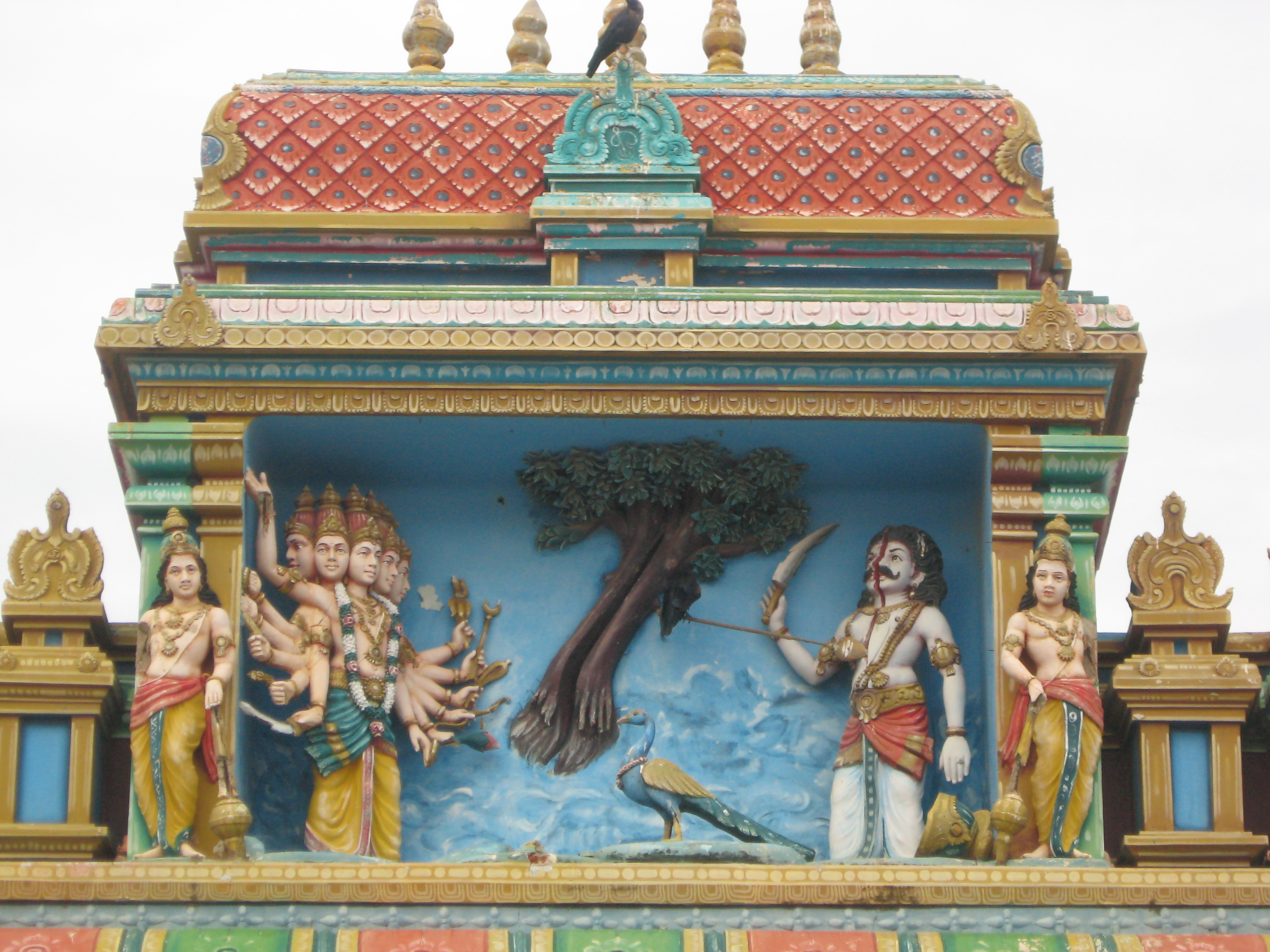 சூர வதம்